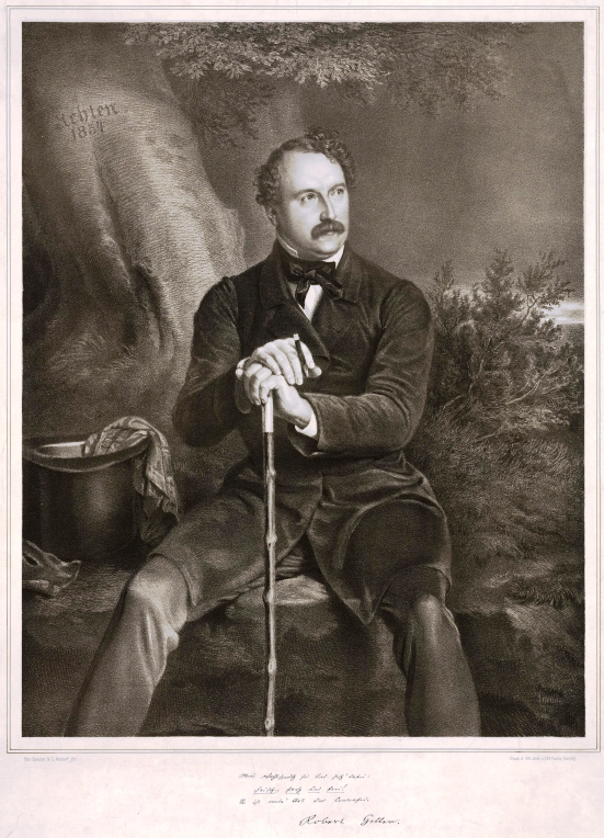 Robert Heller (1814–1871)